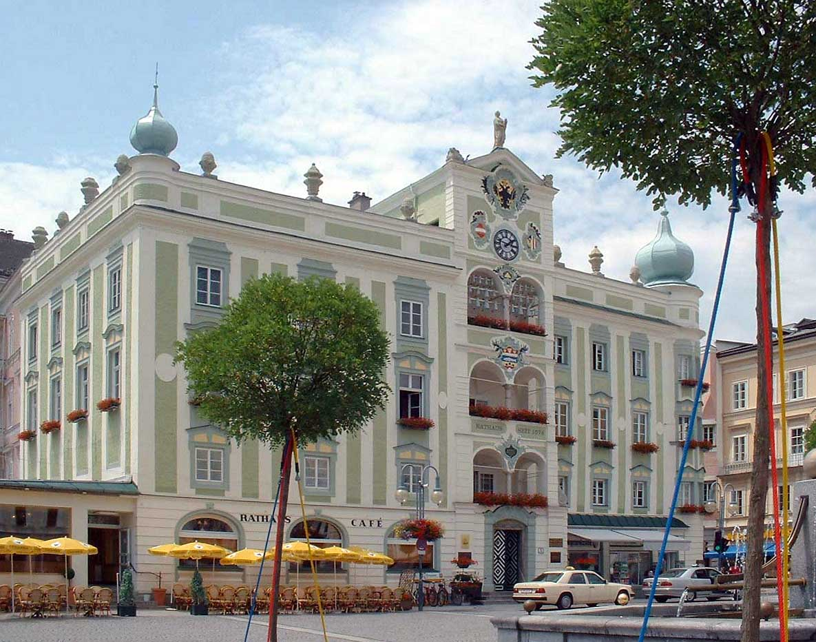 Rathaus von Gmunden mit Keramikglockenspiel, selbst fotografiert 24.06.2003 m.jansen